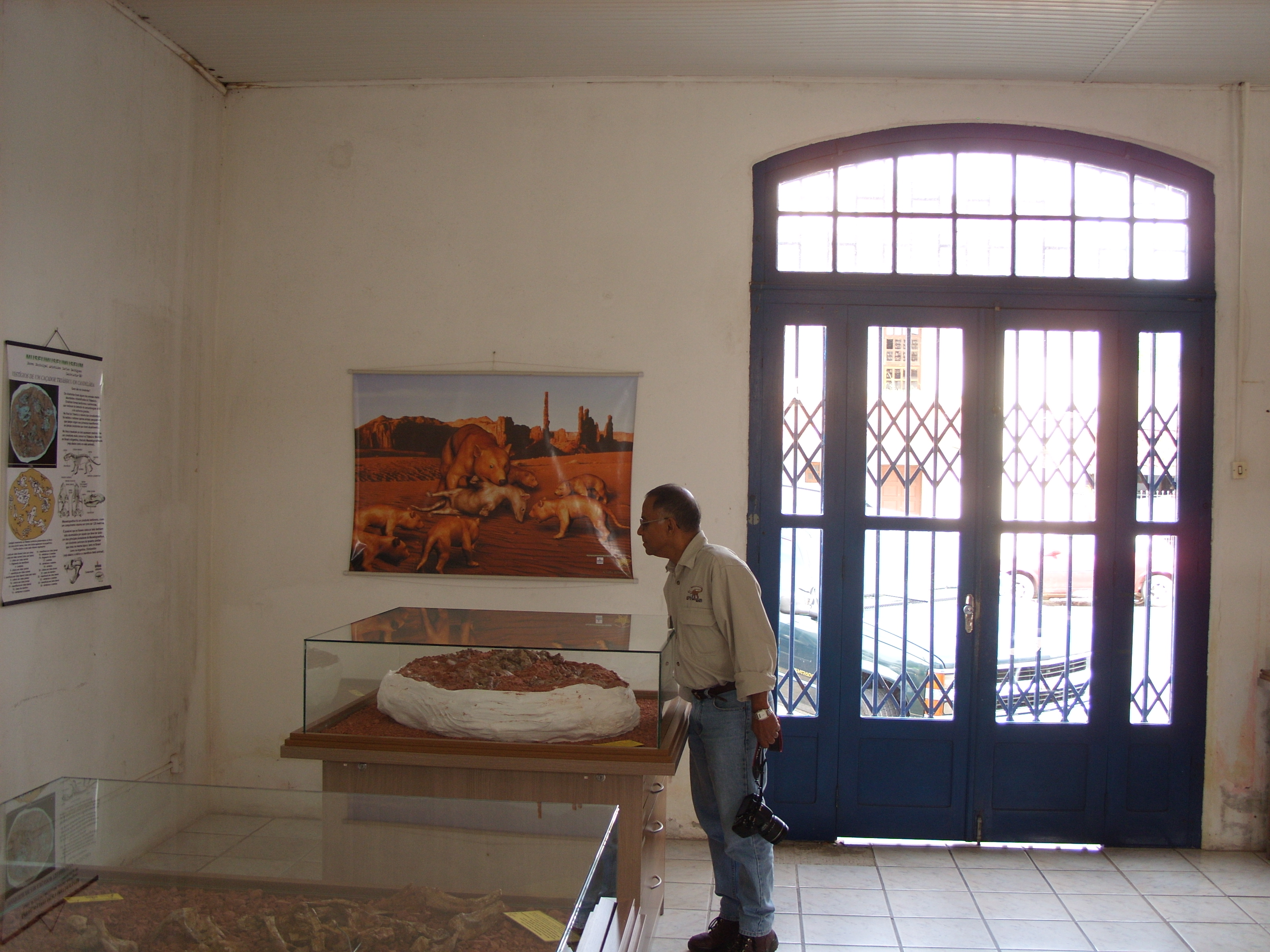 Parte interna do Museu Aristides Carlos Rodrigues, na cidade de Candelária, Rio Grande do Sul, Brasil.